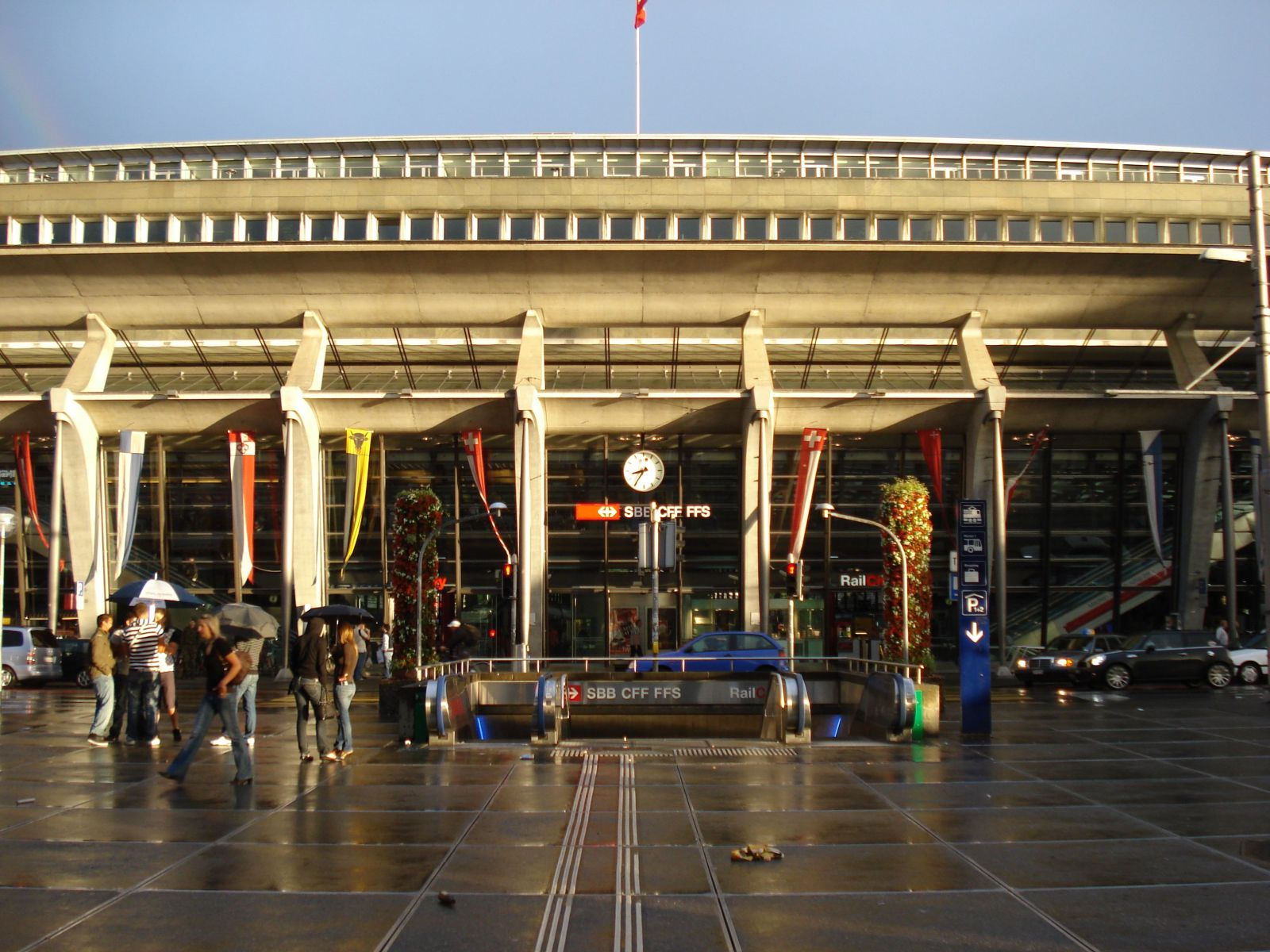 Bahnhof Luzern, Frontansicht Bahnhofplatz. Luzern, Schweiz.